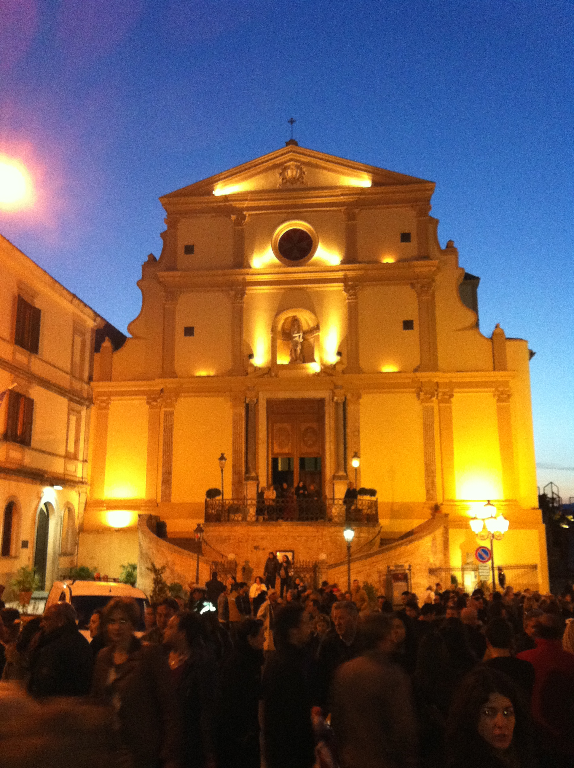 Basilica di San Giovanni Battista - Catanzaro.